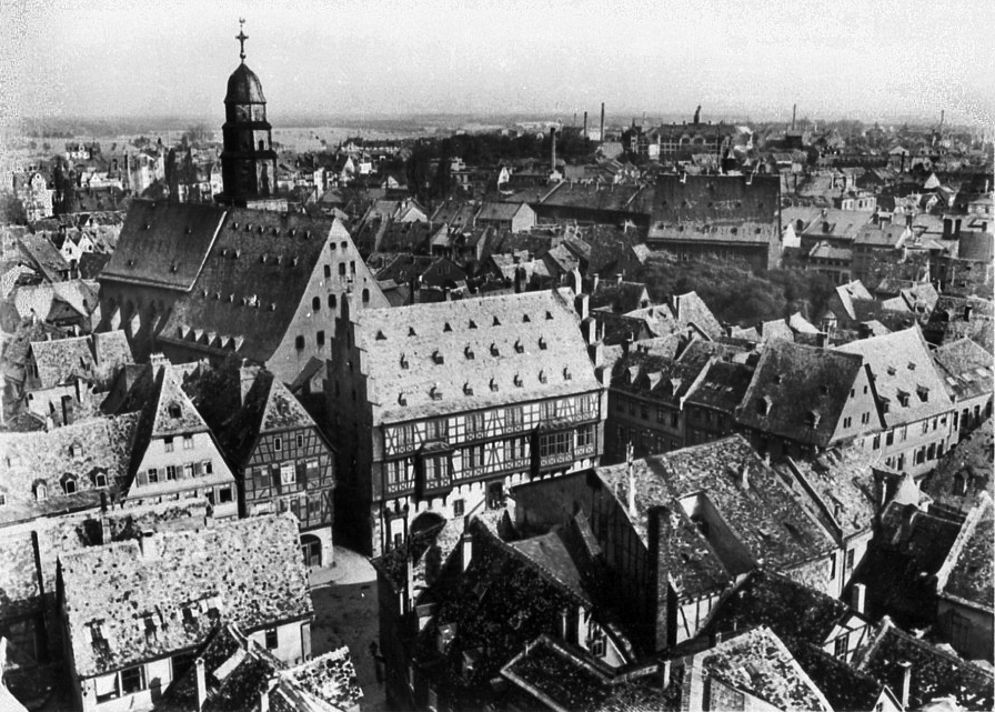 Blick vom Turm der Johanniskirche nach Südosten auf die Marienkirche und den Altstädter Markt.